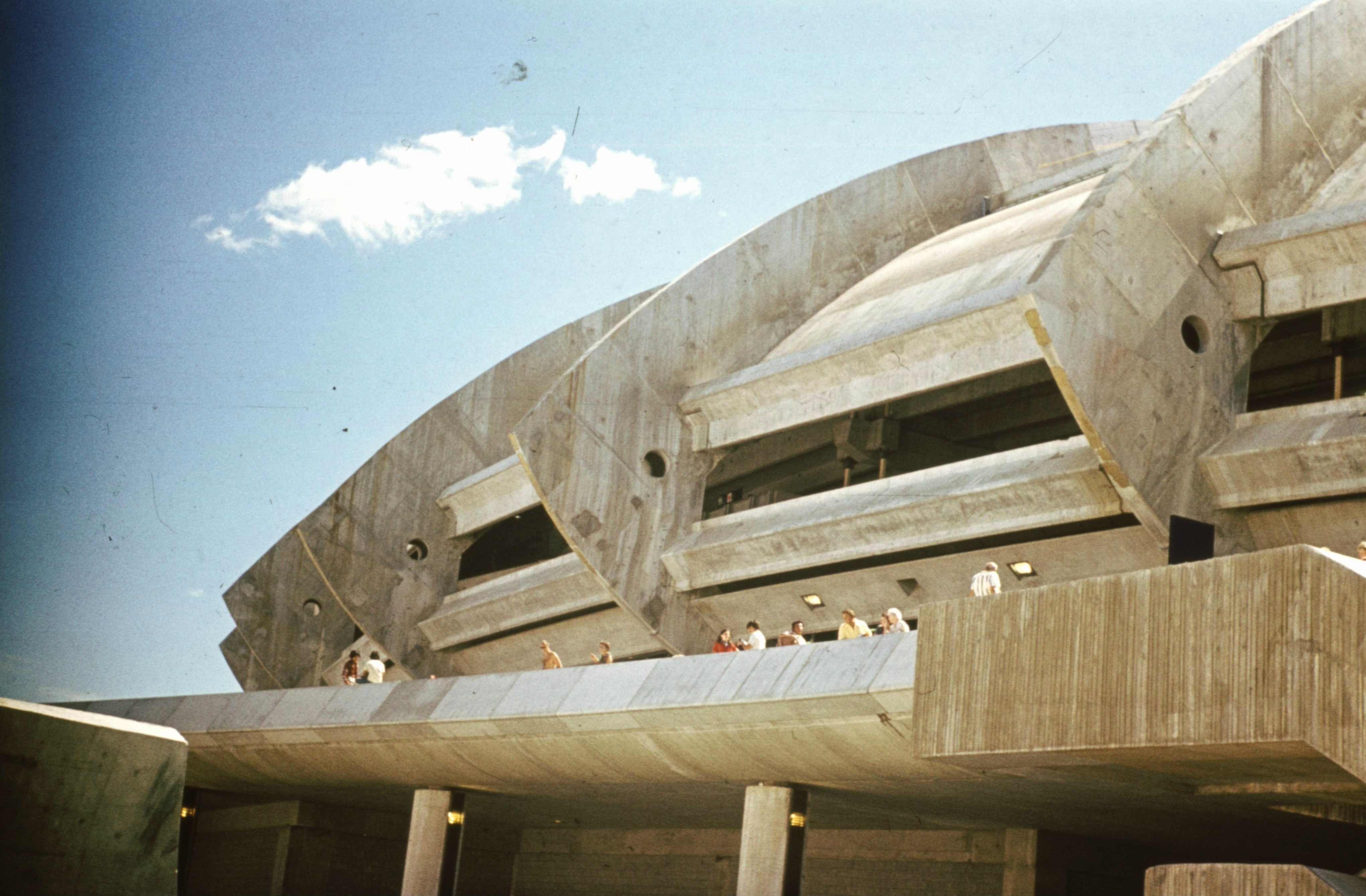 Olimpiai Stadion. Location: Canada Tags: Olympics, colorful, stadium, modern architecture Title: Olimpiai Stadion.